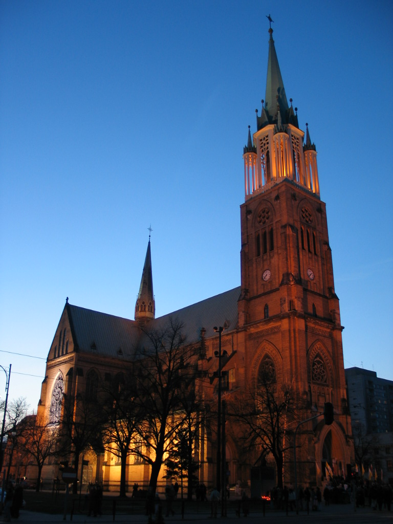 Archikatedra św. Stanisława Kostki w Łodzi